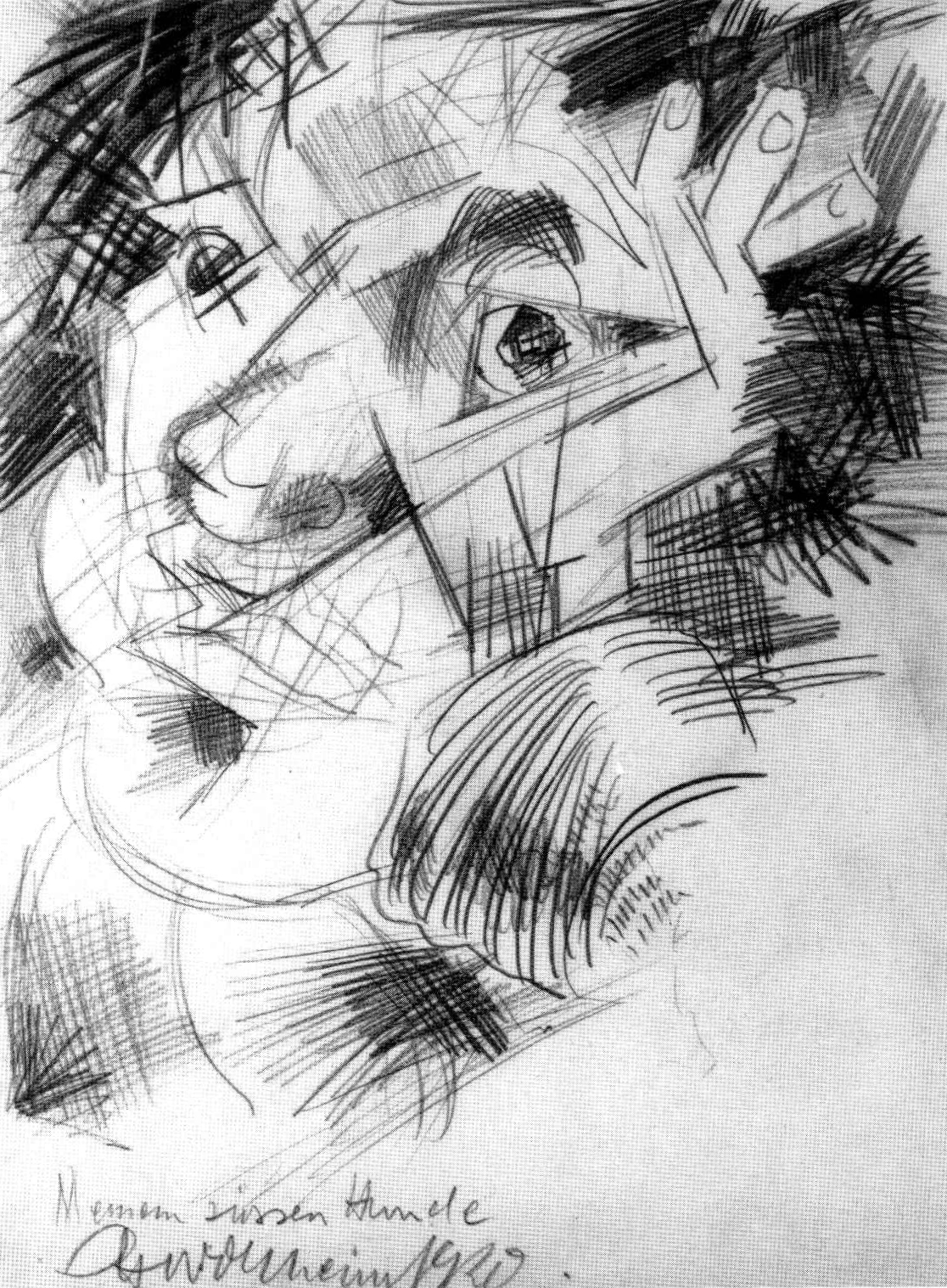 Gert H. Wollheim - Porträt von J. B. H. Hundt